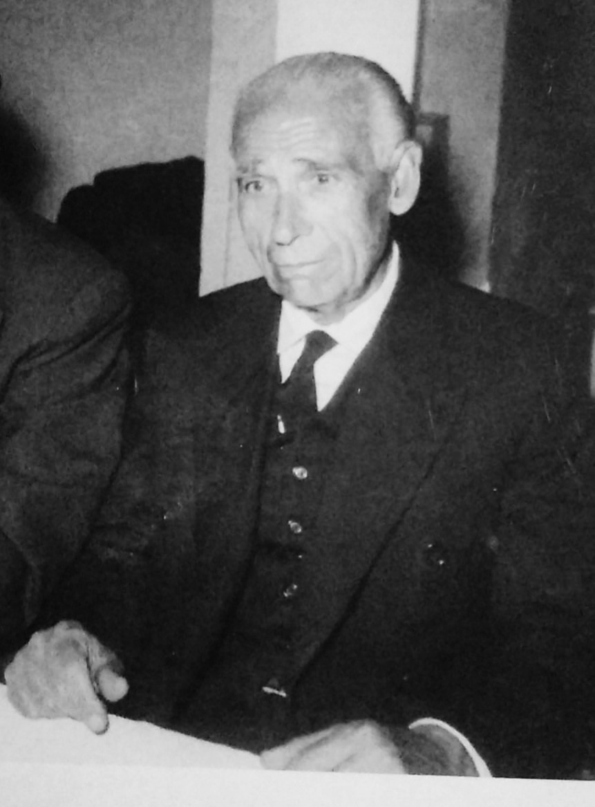 Vicenç Damian en 1954